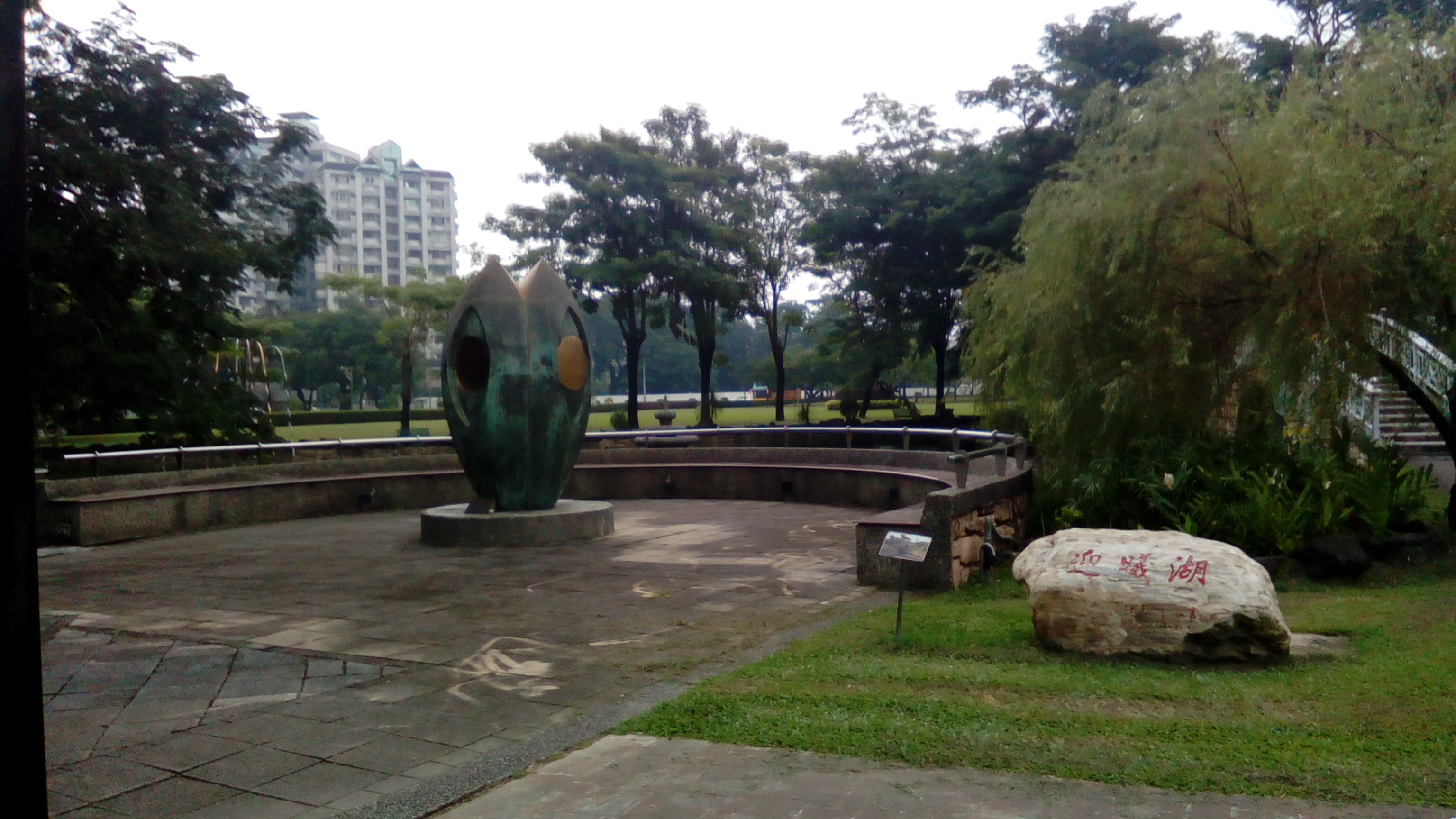 位於湖泊旁